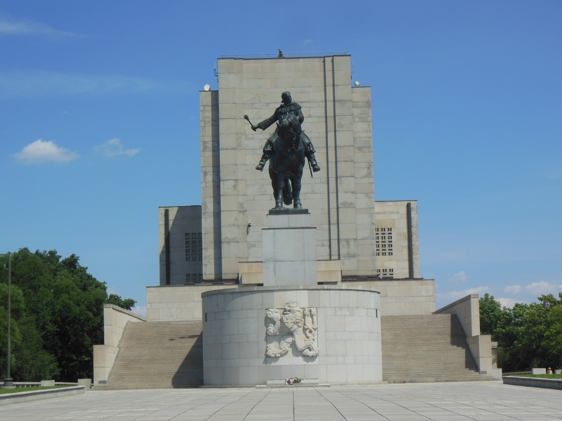 Praha-Žižkov. Národní památník na Vítkově, pohled od západu.